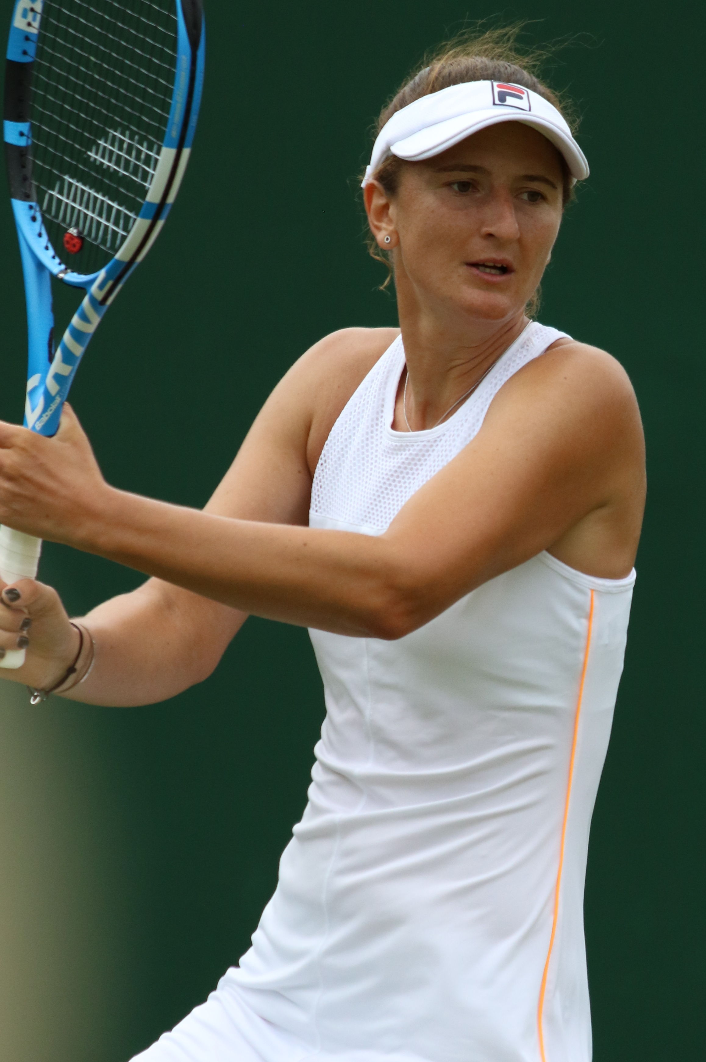 Begu WM19 (16)